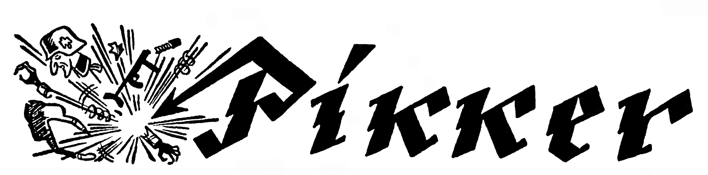 Pikker, päis 1944–1945